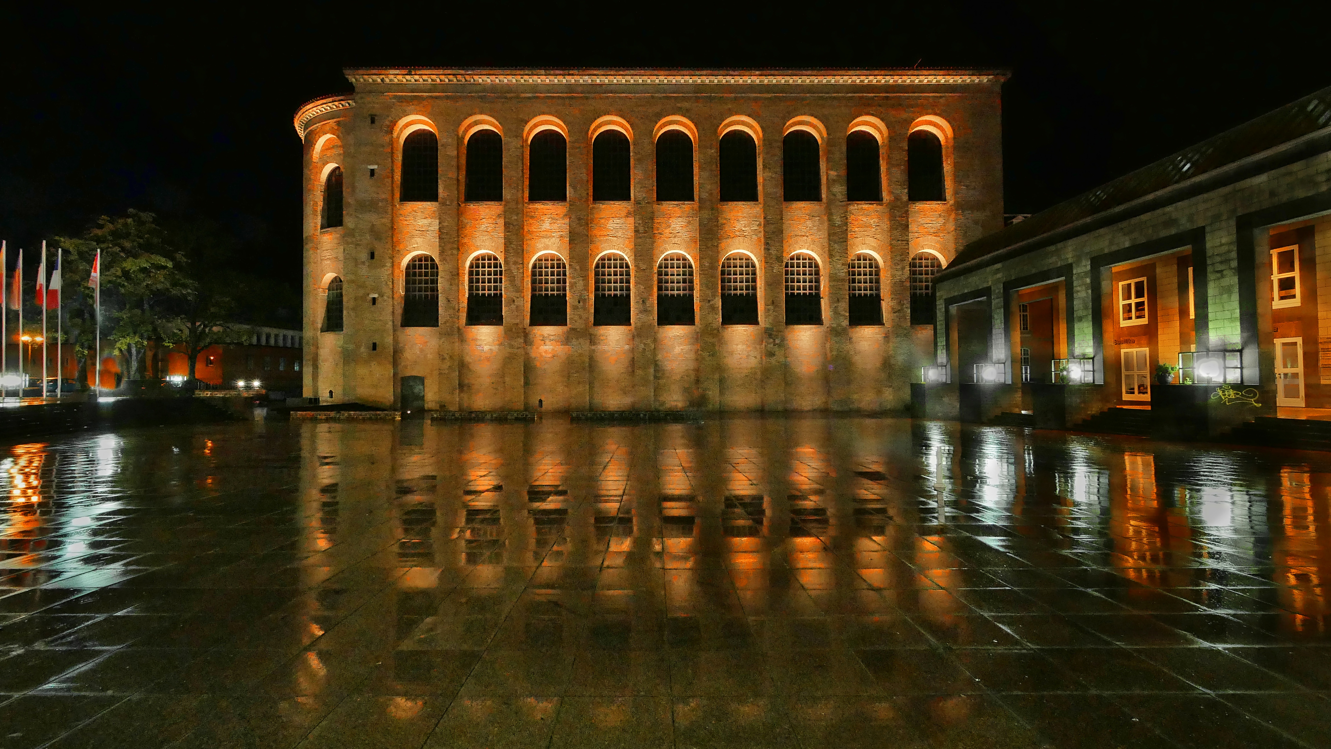 Konstantinbasilika Trier, neue Illumination seit dem 31. Oktober 2017